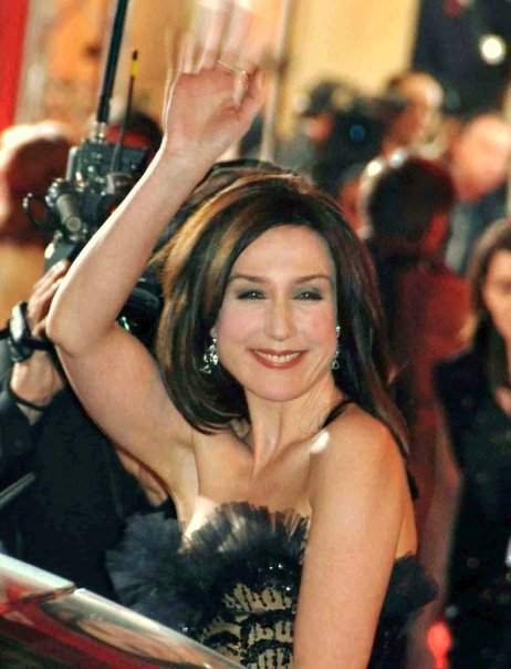 Elsa Zylberstein à la cérémonie des Césars.